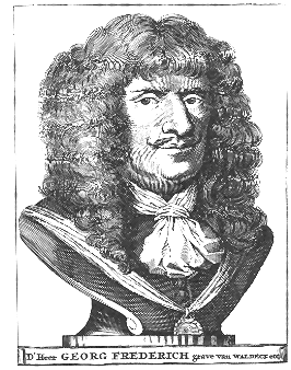 Fürst Georg Friedrich von Waldeck (1689-1692); Dutch picture (Engraving)